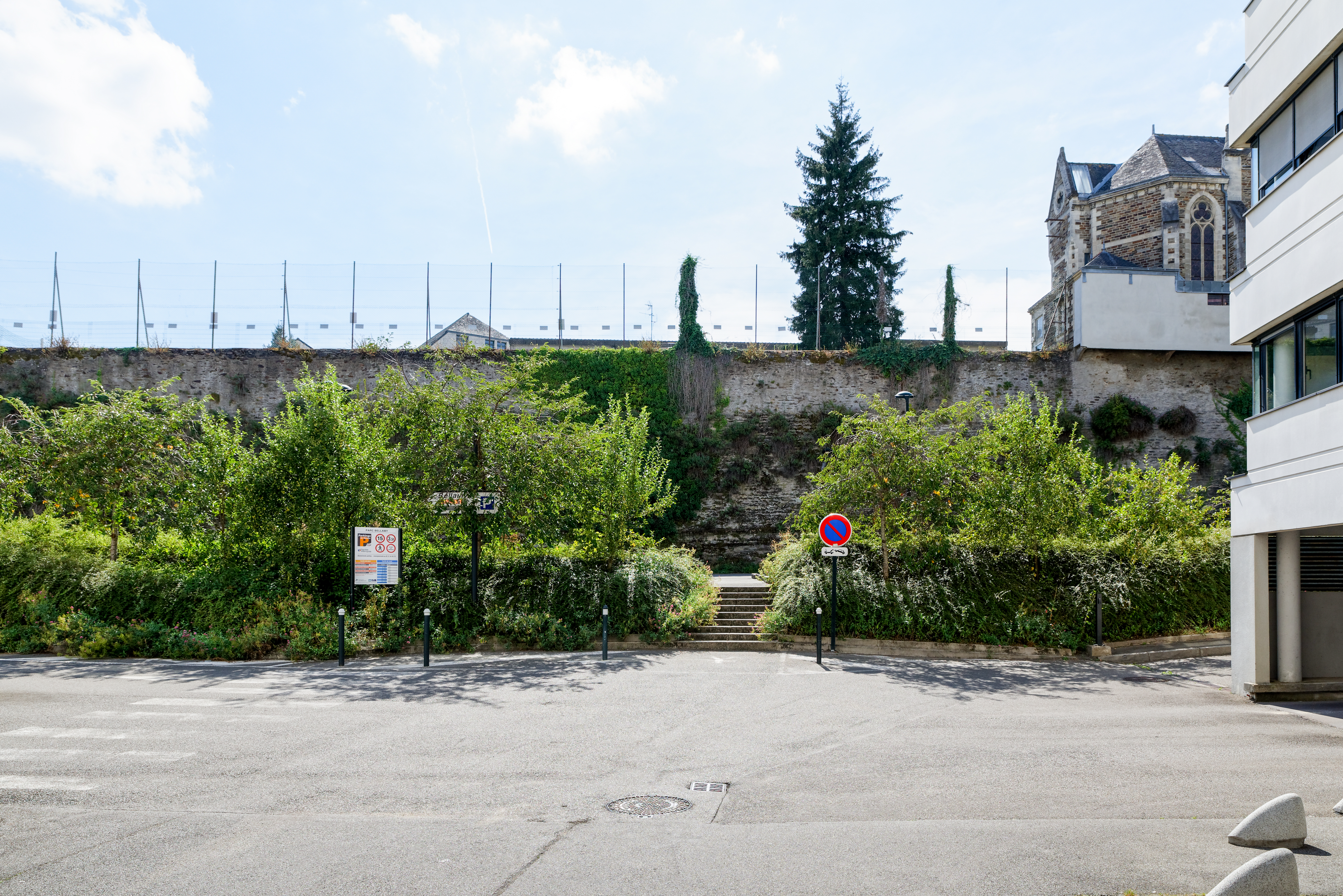 Vestiges des fortifications Mercœur, 25 rue Paul-Bellamy (impasse de la Courtine). (Nantes, Loire-Atlantique, Pays de la Loire, France)